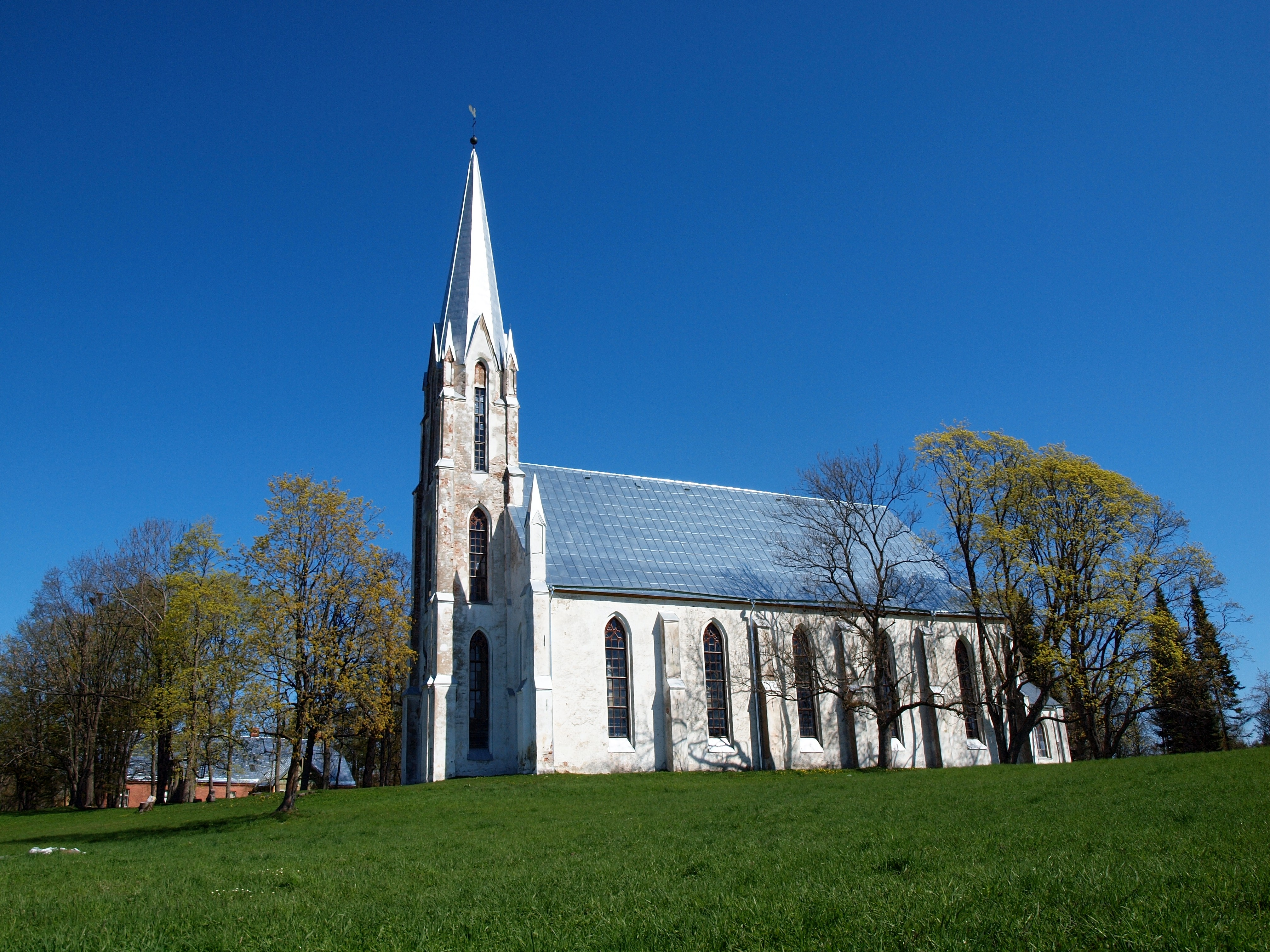 Maarja-Magdaleena kirik